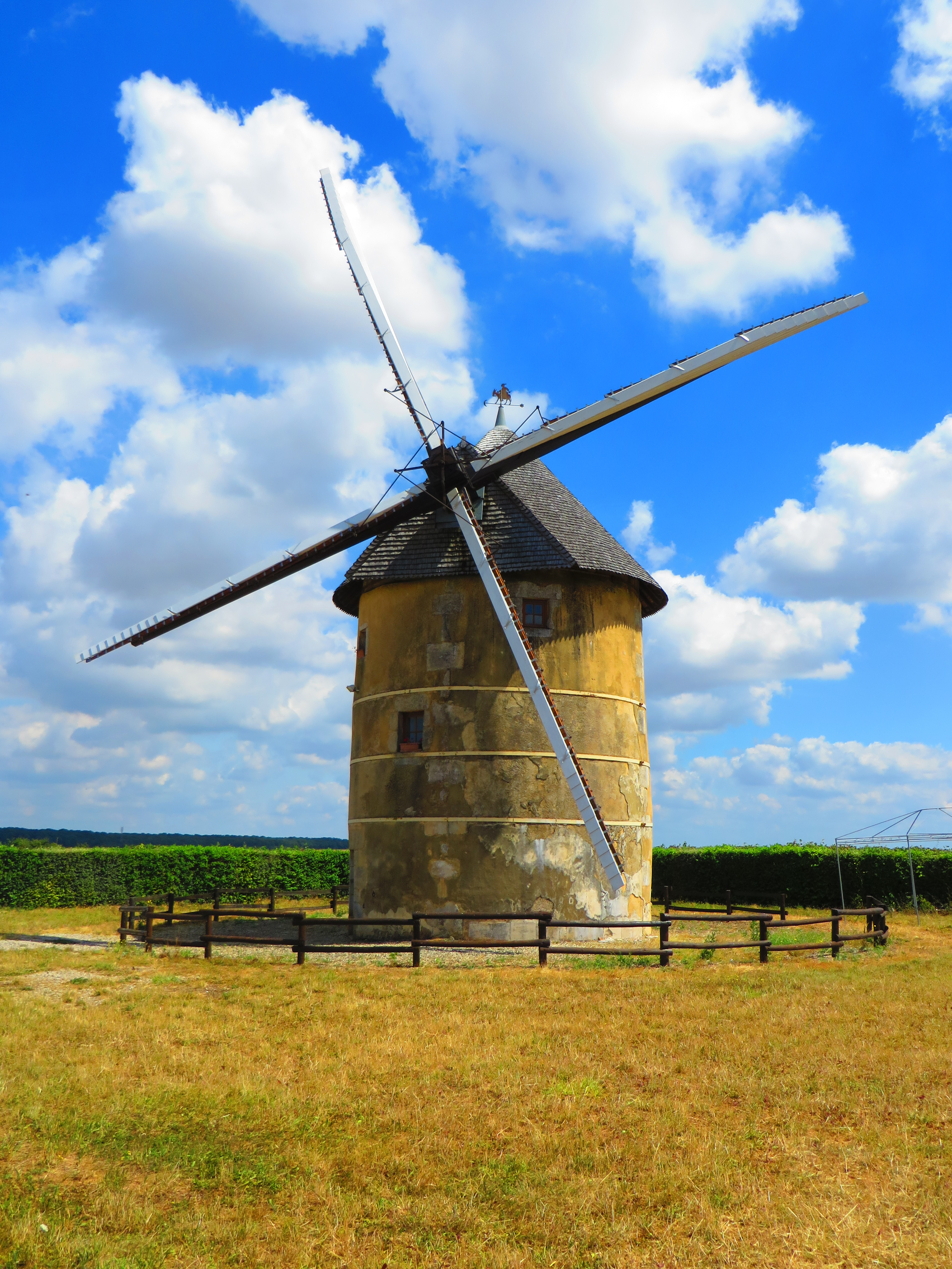 Mige moulin